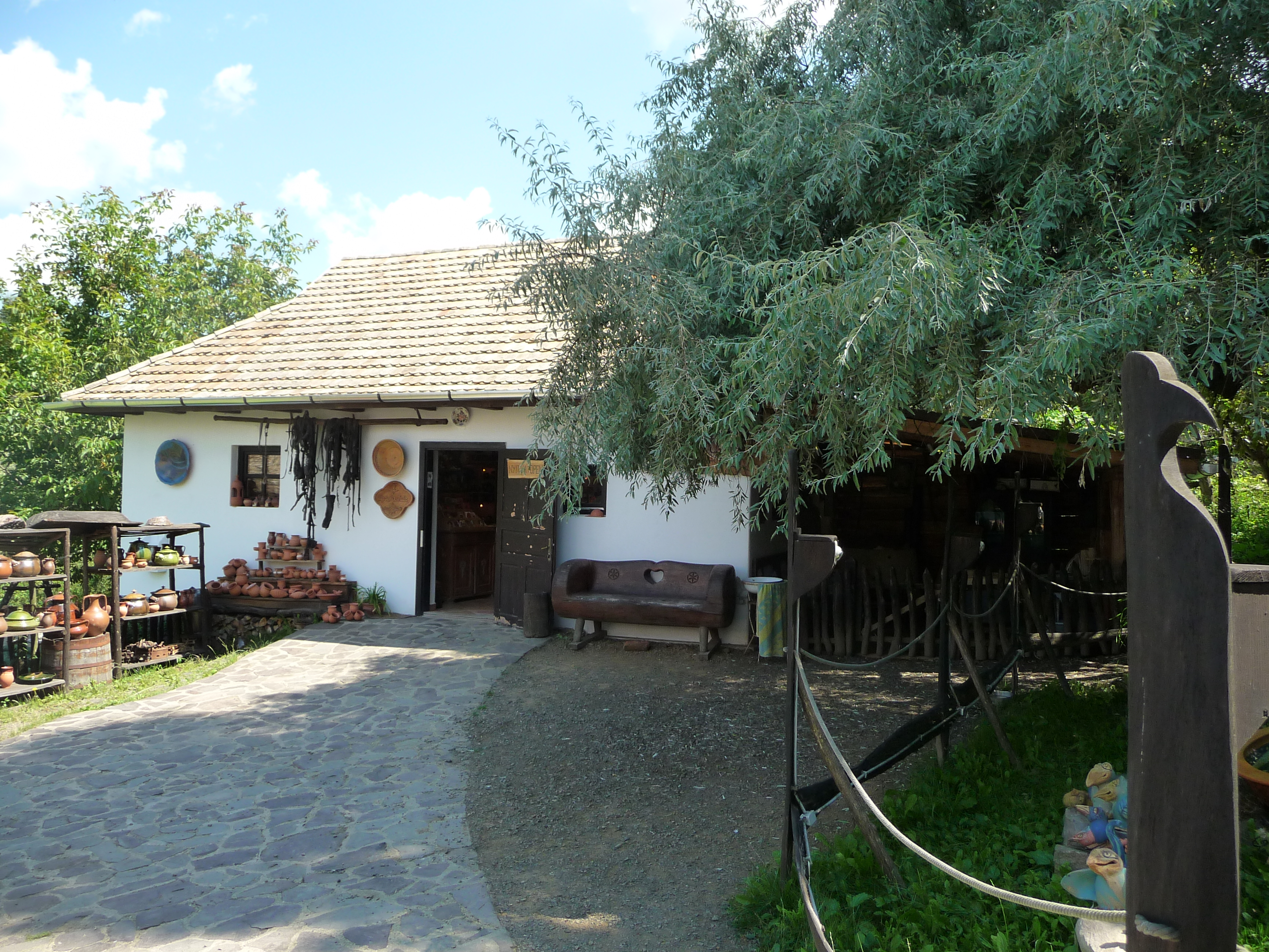 Hollókő, a Fazekasház boltja